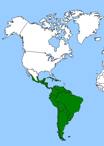 écozone néotropique